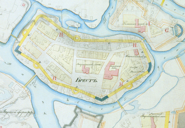 Праектаванне крапасных пабудоў на месцы гістарычнага Берасця